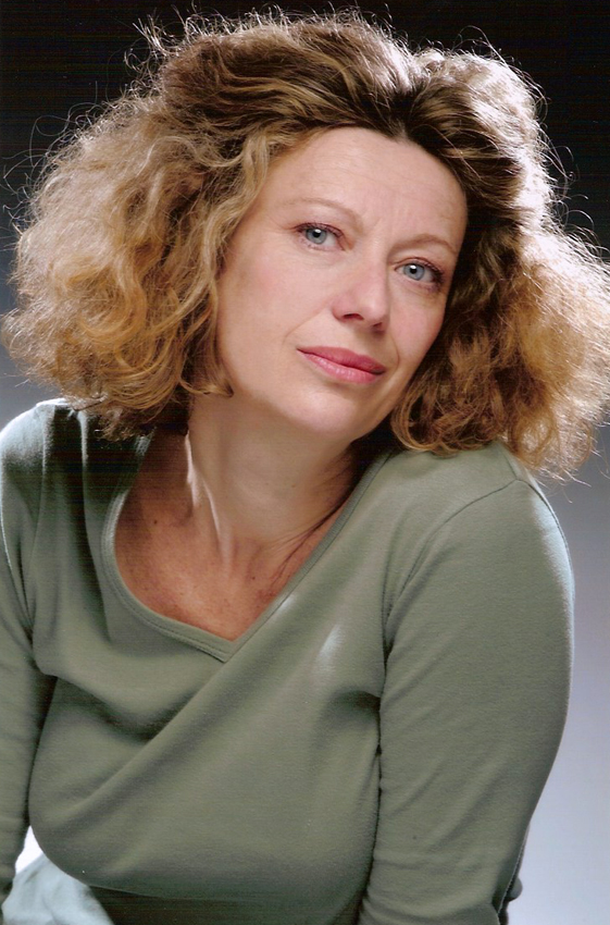 Portrait Caroline Beaune